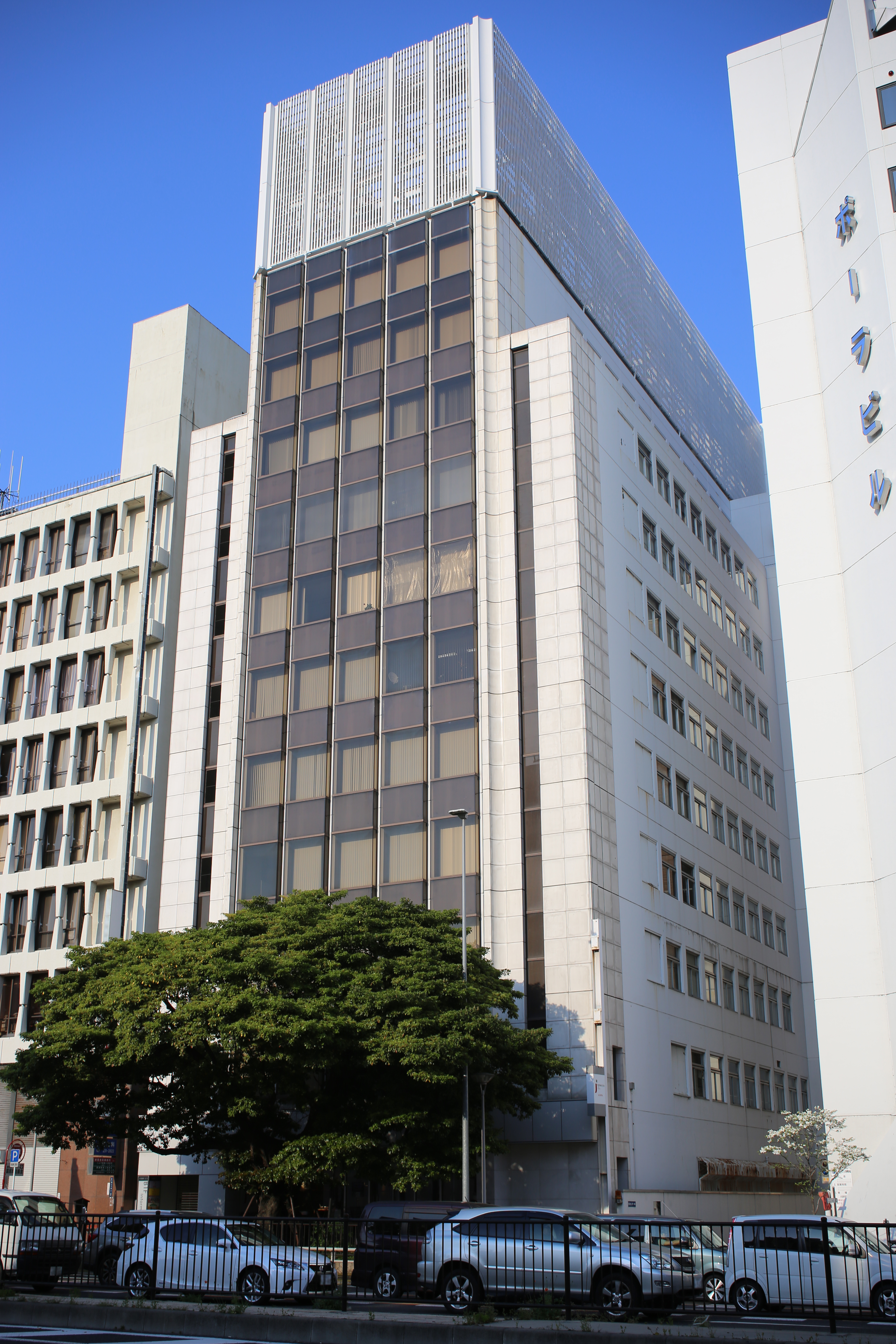 名古屋市中区栄二丁目の伏見第一ビルを西側公道南側より撮影。ただし、ナンバープレートにつき画像処理済み。